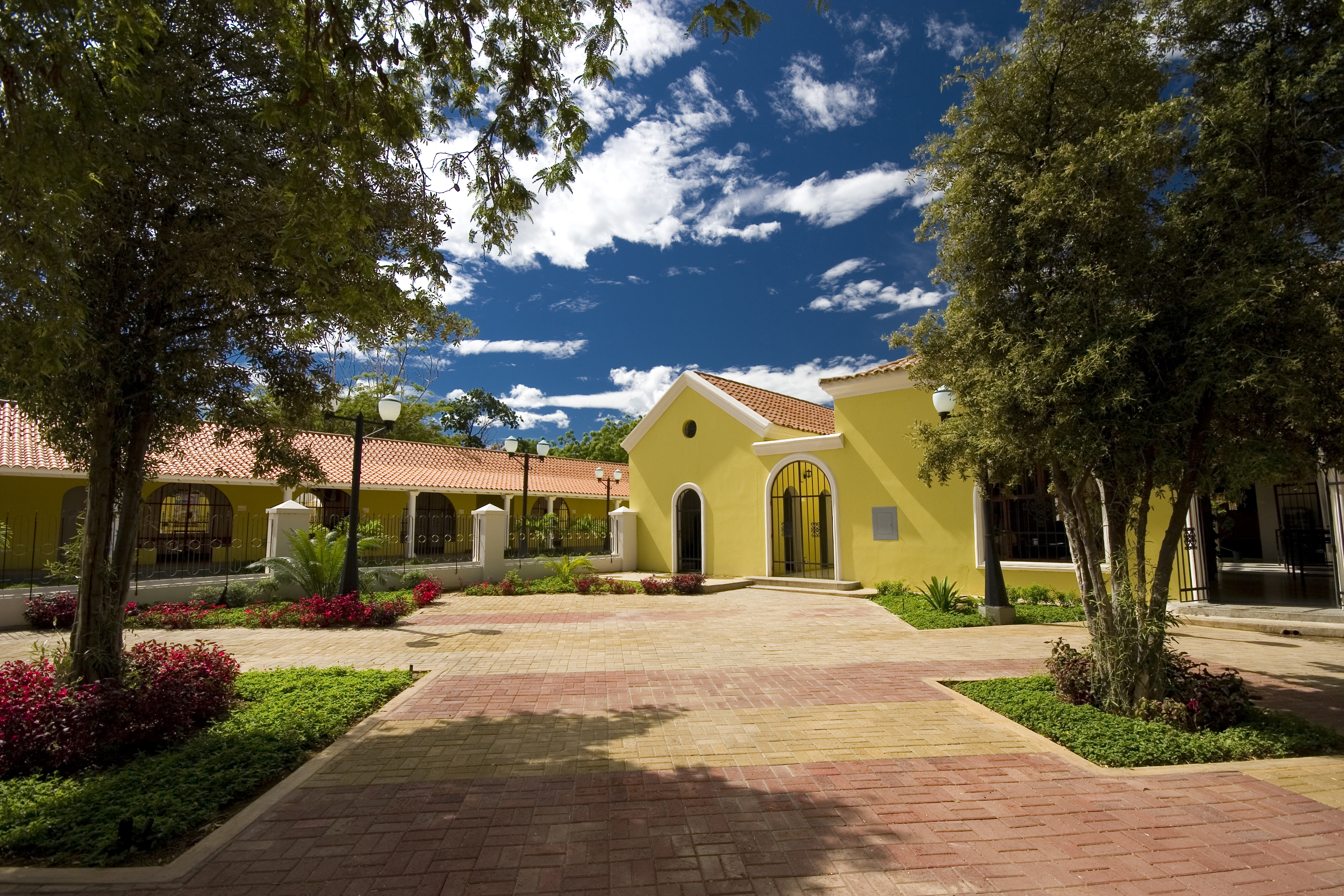 Casco central Santa Ana de Coro, estado Falcon, Venezuela